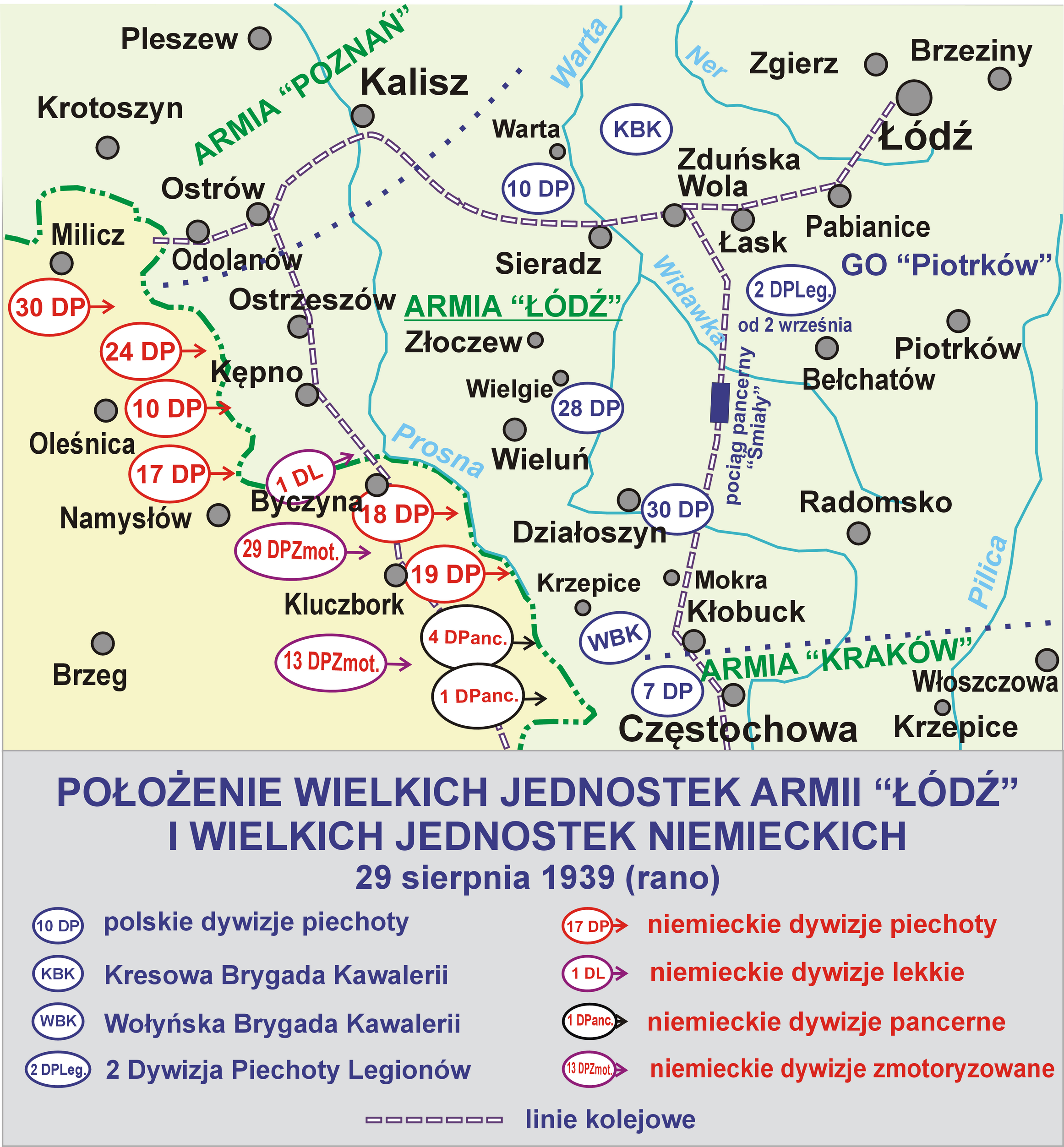 Położenie wielkich jednostek Armii "Łódź" i wielkich jednostek niemieckich 29-08-1939 (rano)